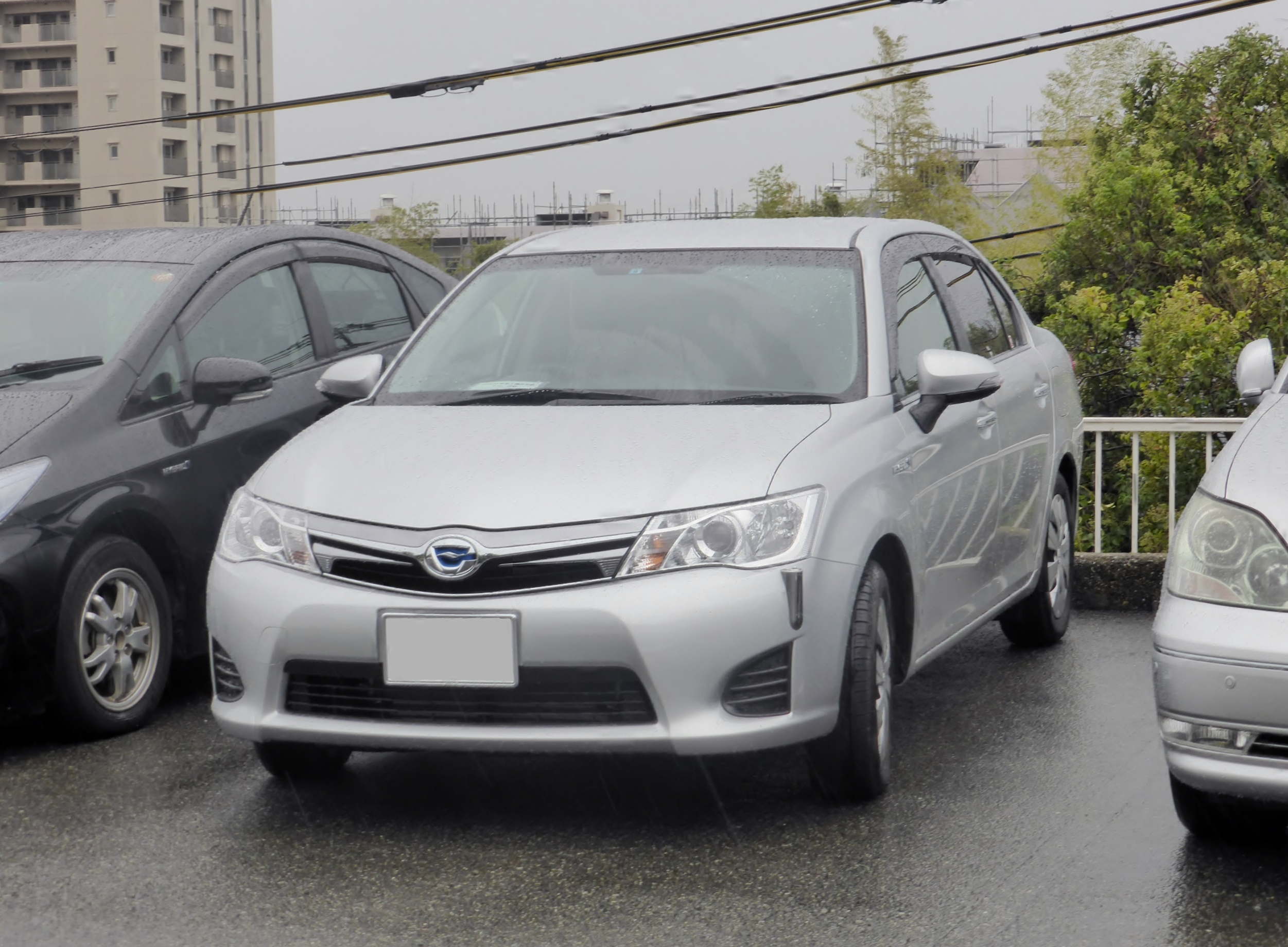 NKE165型トヨタ・カローラアクシオハイブリッドをフロントから撮影。